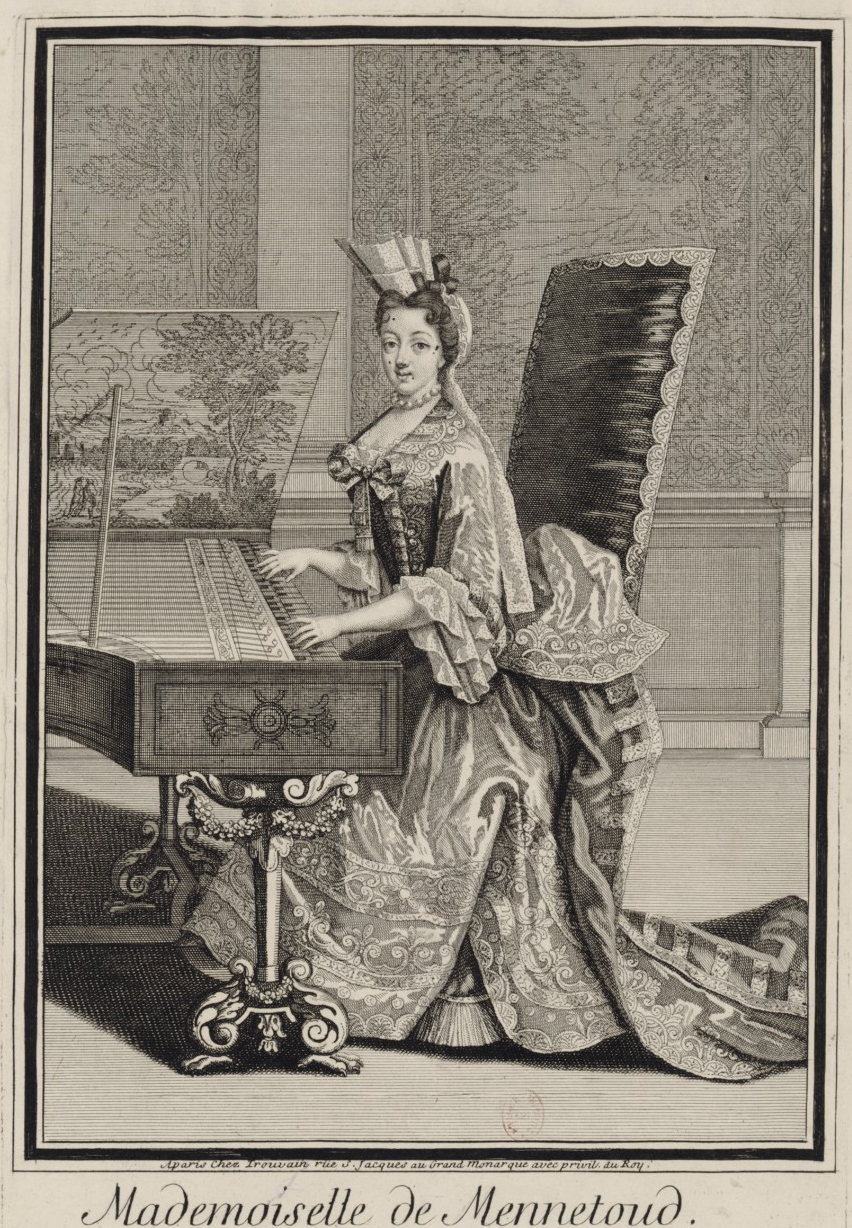 Mademoiselle de Mennetoud, assise et jouant du clavecin